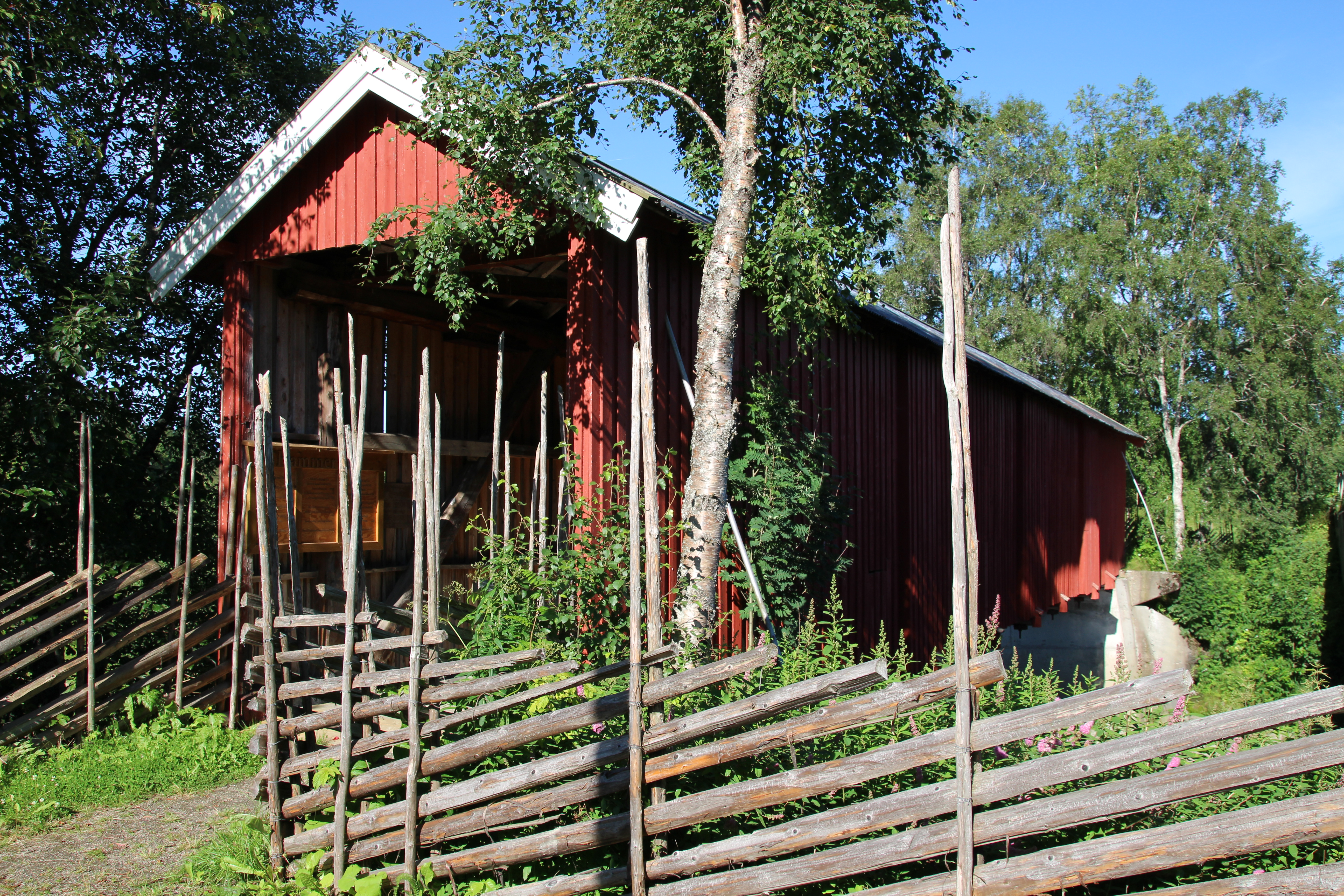 Hammer bru, Høylandet kommune i Nord-Trøndelag.